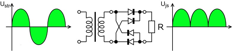 Graetz usměrňovač